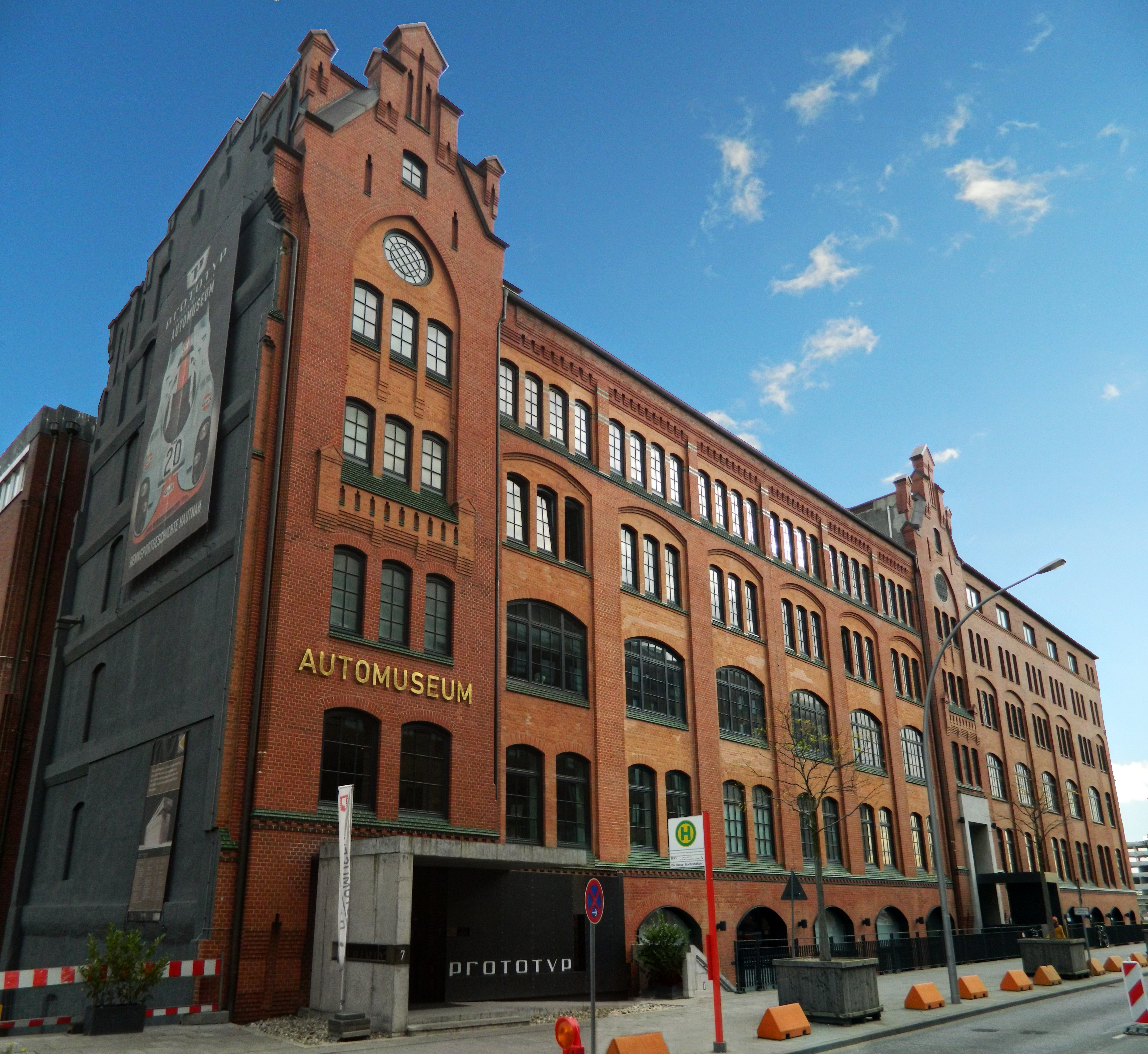 Automuseum